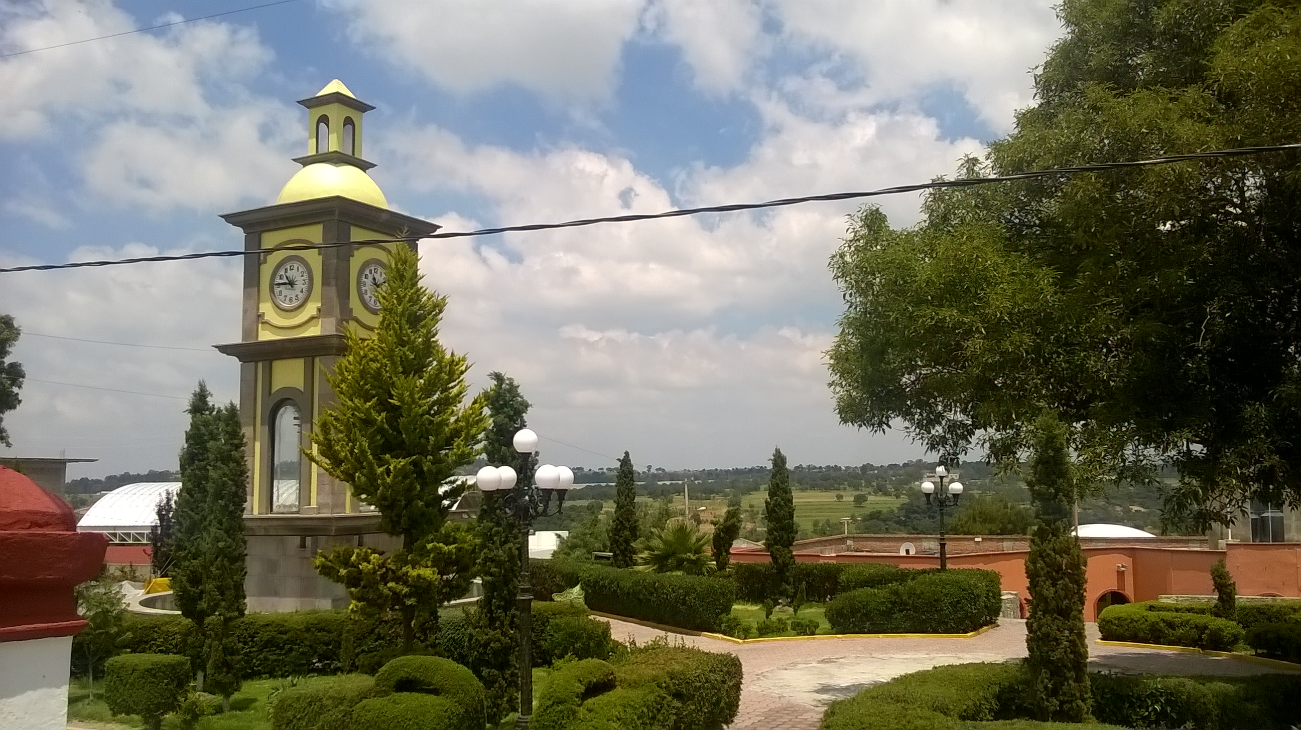 San Lucas Tecopilco, Tlaxcala